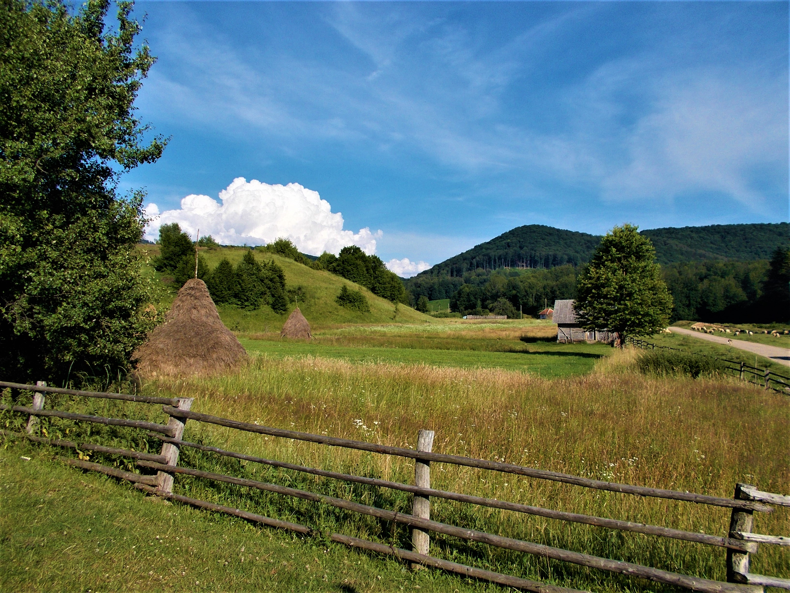 Ponorul Runcșor din Munții Pădurea Craiului